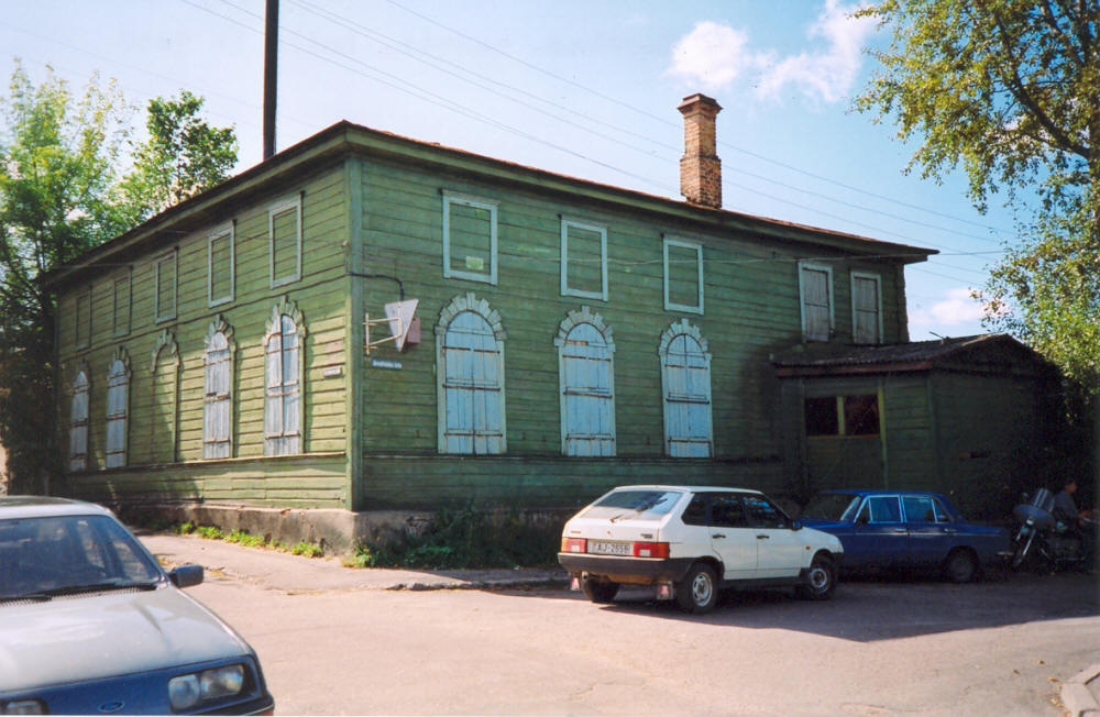 Rēzekne synagogue